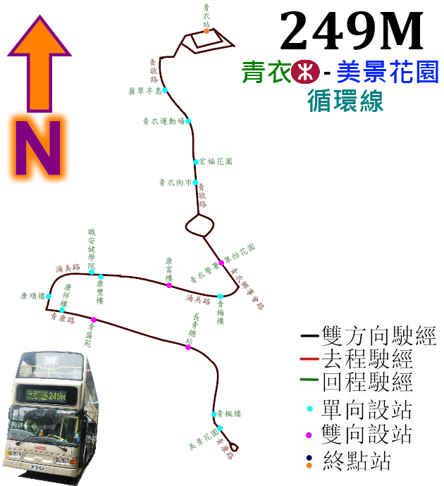 中文（香港）: 九巴249M線的走線圖